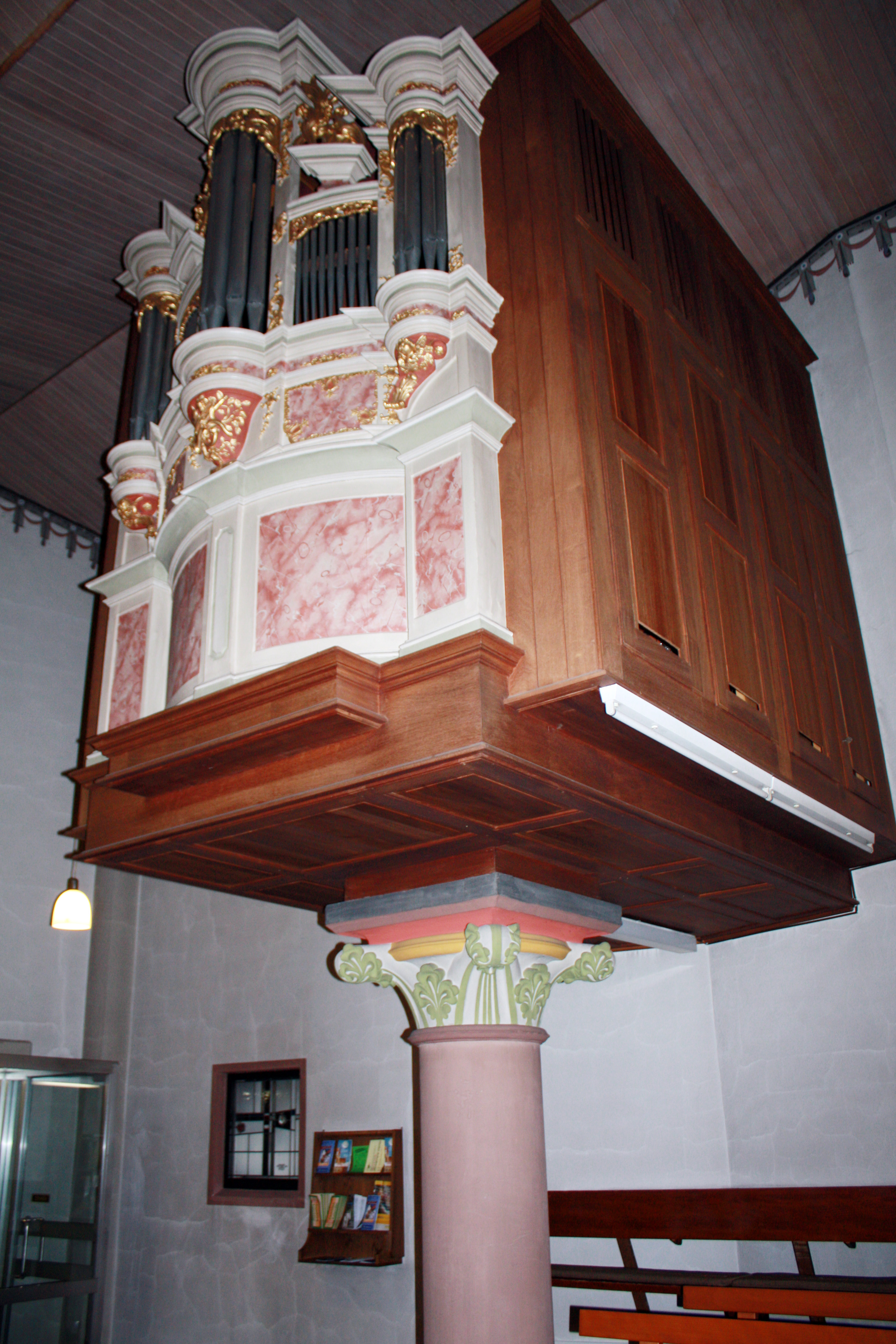 Hürth-Fischenich, St. Martin Kirche. Orgel aus dem ehemaligen Kloster Benden